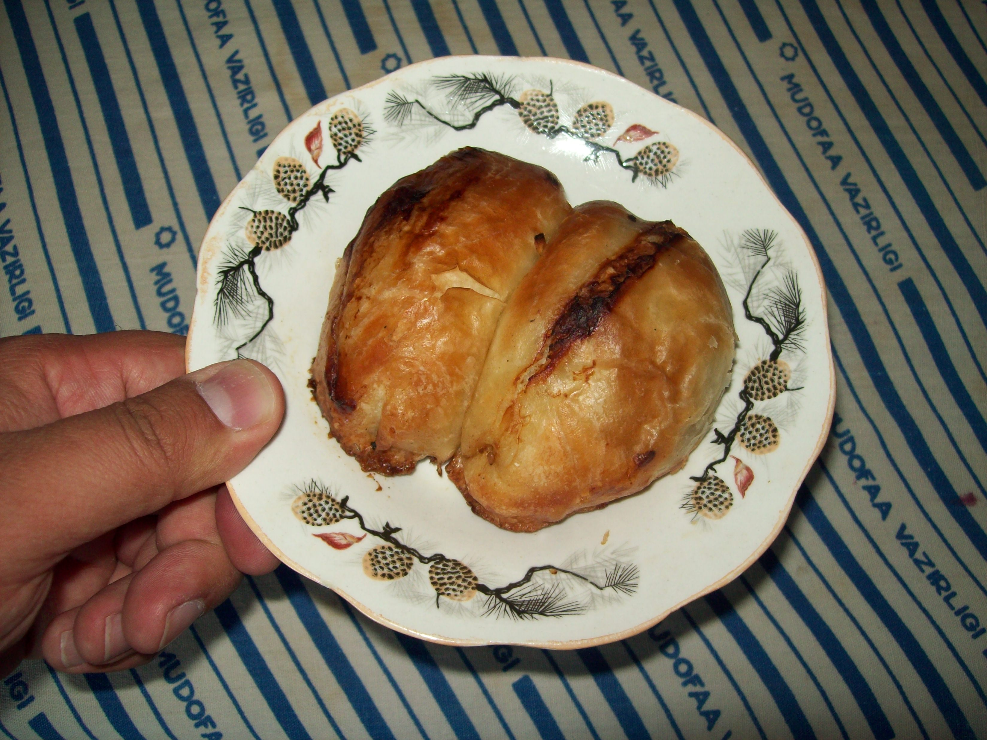 Самса Пармуда - старинный рецепт приготовления узбекской самсы.